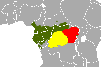 Verbreitung: Kronenmeerkatze (Cercopithecus pogonias), grün Wolf-Meerkatze (C. wolfi), gelb Dent-Meerkatze (C. denti), rot